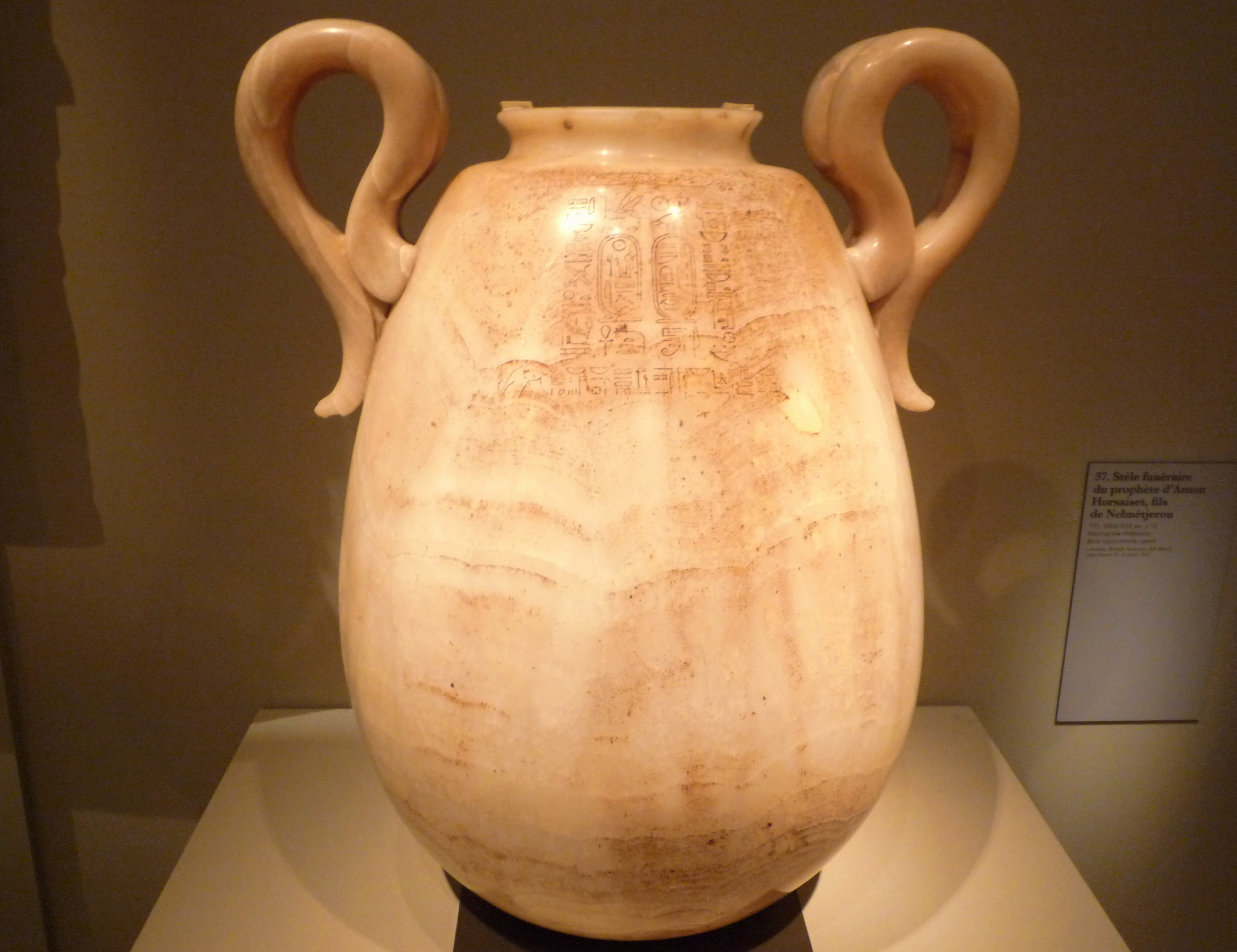 Alabastre dédié par le prophète d'Amon, Nebnétjerou, fils de Hor probablement destiné à contenir des onguents pour le culte, (791 - 763 av. J-C), albâtre égyptien (calcite), découverte à Rome en 1615, collection musée du Louvre - Servir les dieux d'Égypte du 25 octobre 2018 au 27 janvier 2019 - Musée de Grenoble